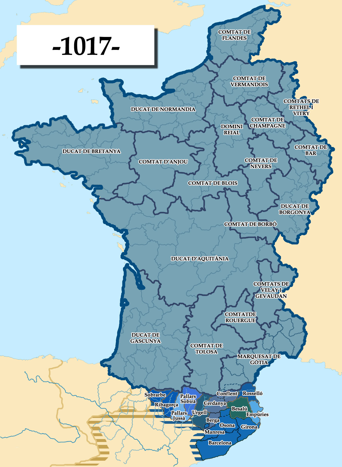 Regne de França el 1017 i territoris sudpirinencs